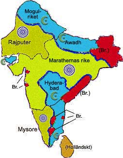 Indien, karta, Maratherriket, egentillv.